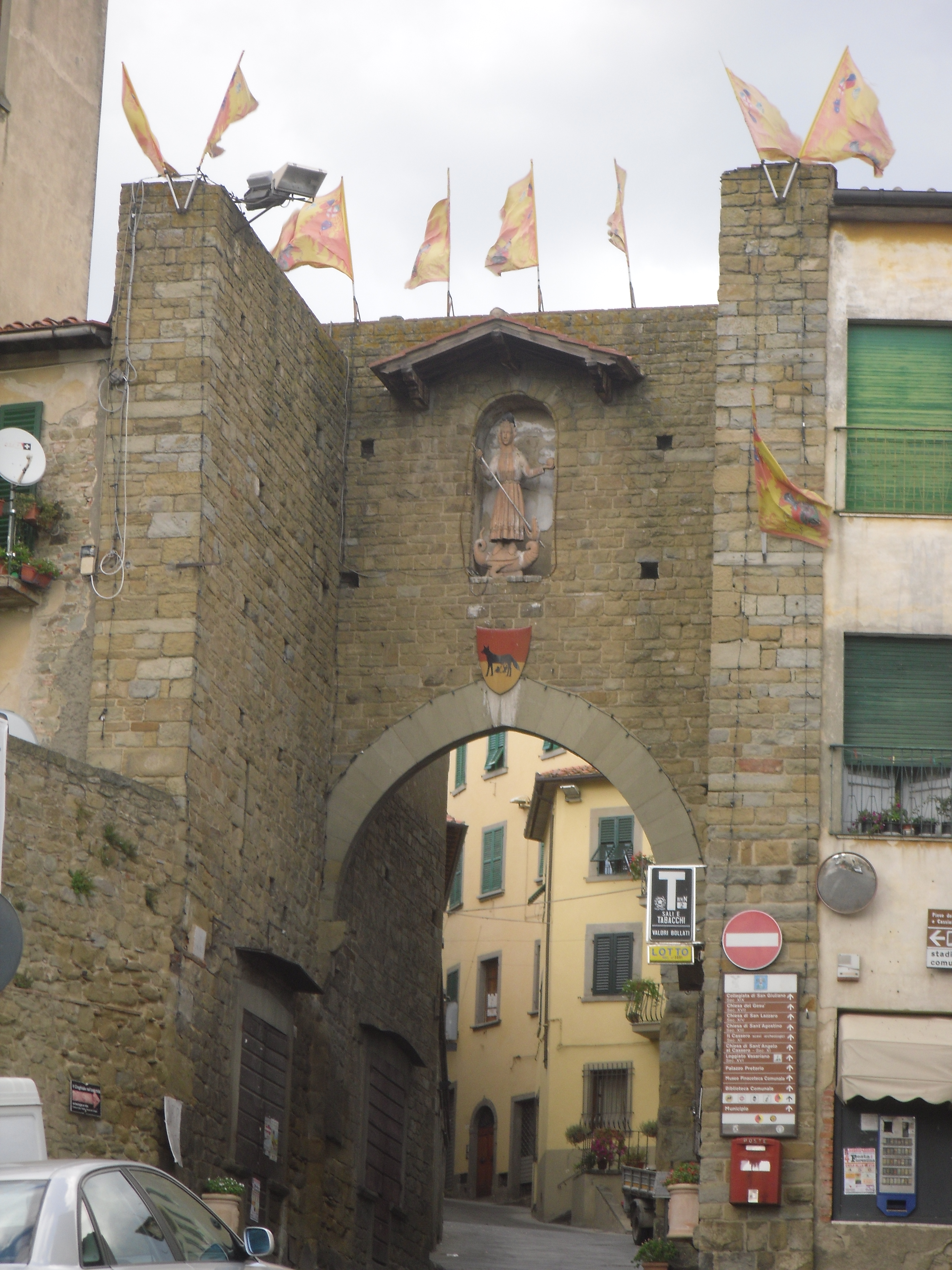 Porta San Michele (Porta Romana), Castiglion Fiorentino, Arezzo, Italia